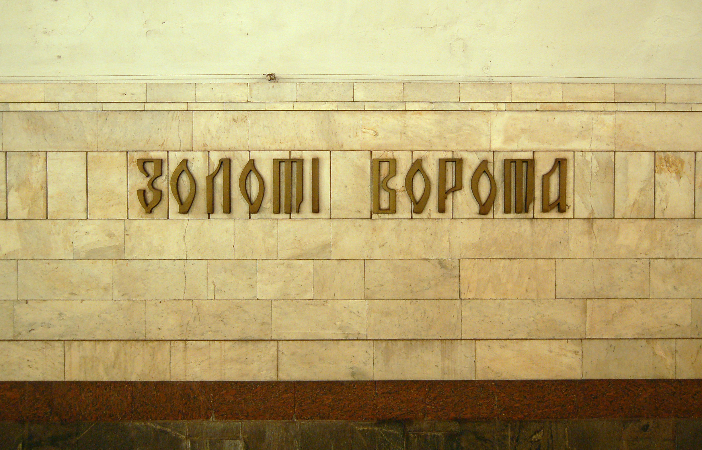 Cтанция метро «Золотые ворота», название на путевой стене